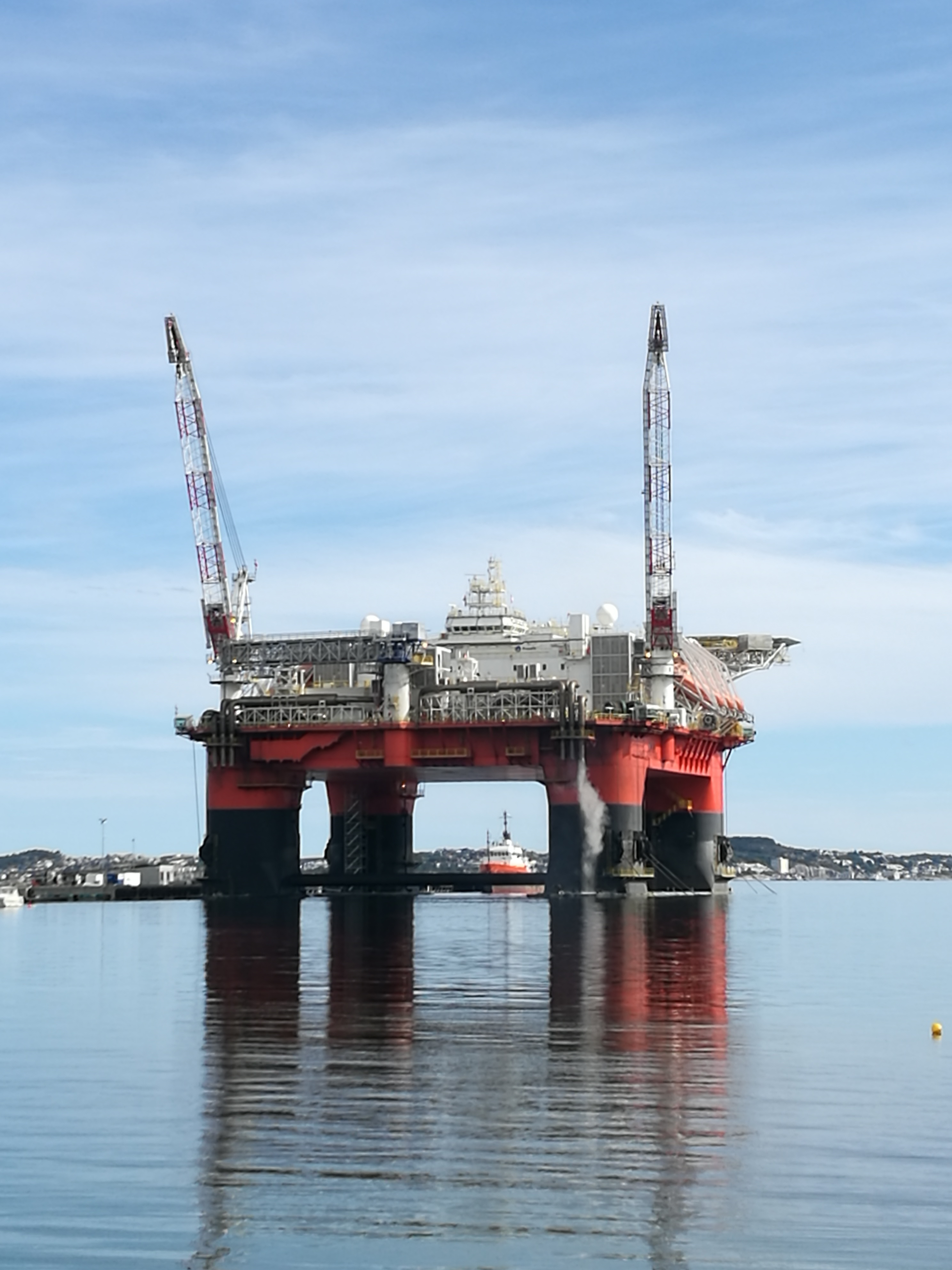 Boligrigg/Flotell «Safe Zephyrus» (IMO 9679517) i reaktiviseringsprogram ved Averøy Industripark ifrb med oppdrag for Statoil på Johan Sverdrup-feltet i 2018.